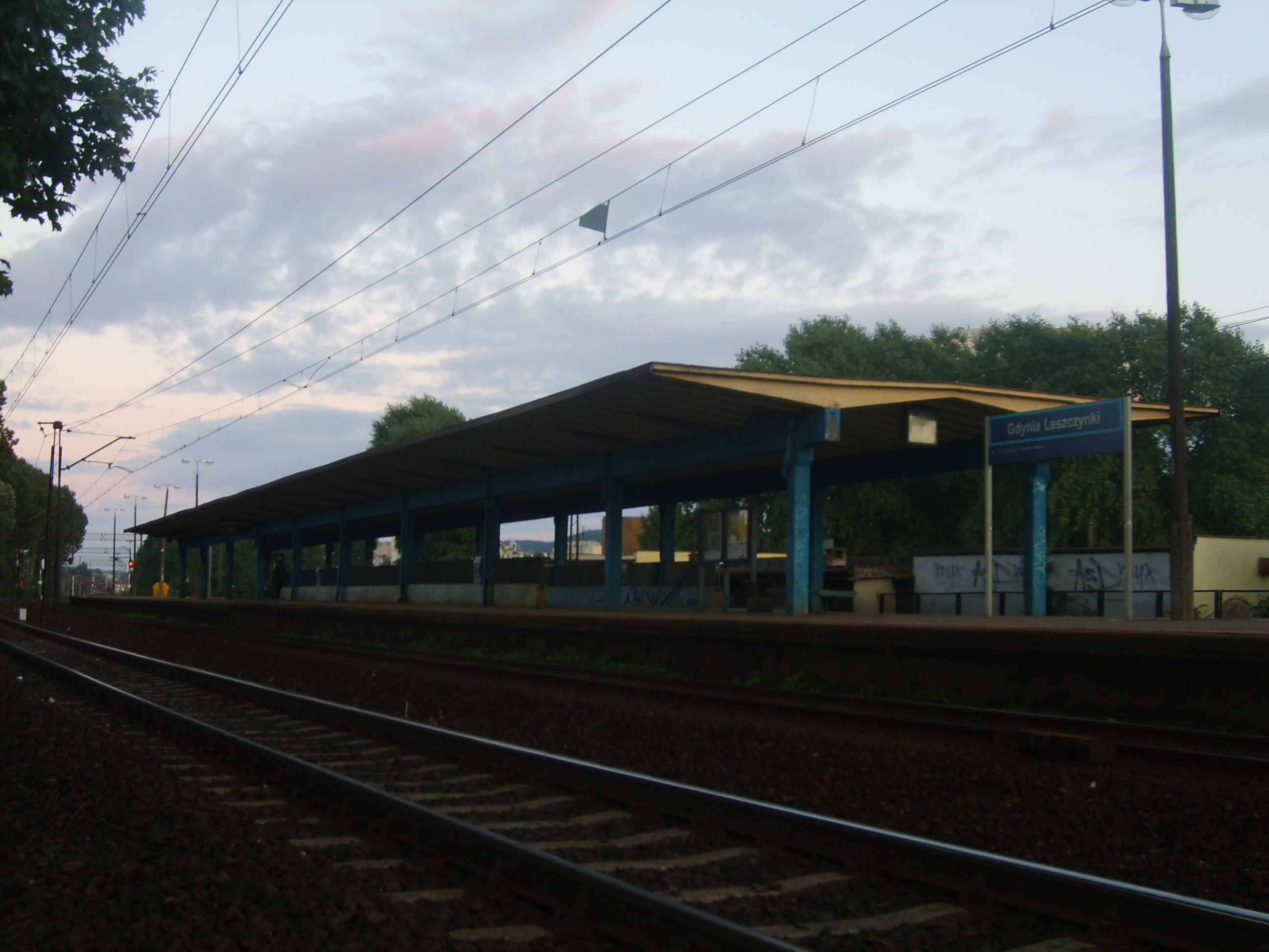 Przystanek SKM Gdynia Leszczynki.